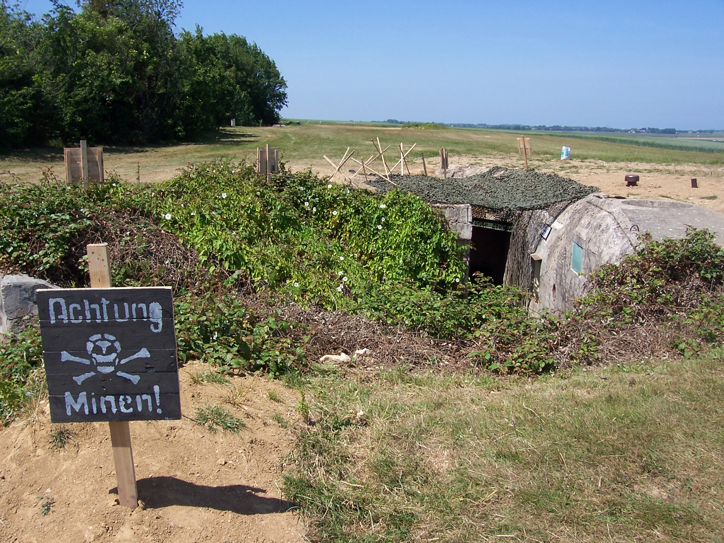 Reconstitution sur le site Hillman lors des commémorations du 6 Juin 1944.